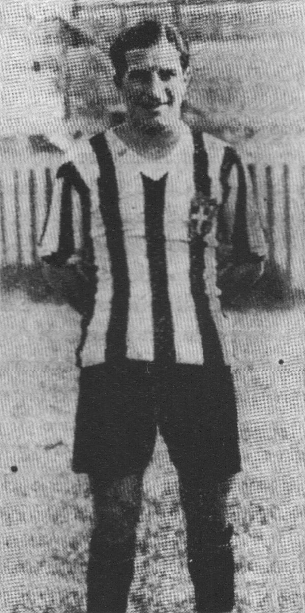 Il calciatore argentino Juan José Maglio alla Juventus nella stagione 1931-32.